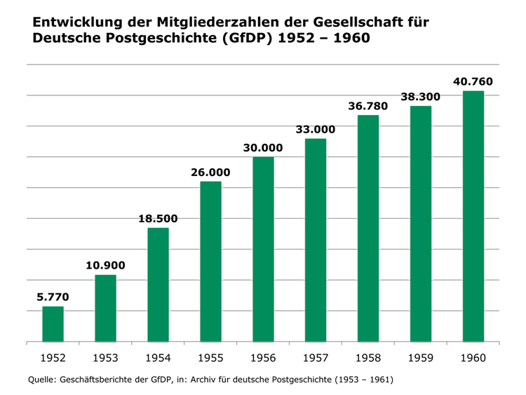 Die Entwicklung der Mitgliederzahlen der „Gesellschaft für Deutsche Postgeschichte“ von 1952–1960